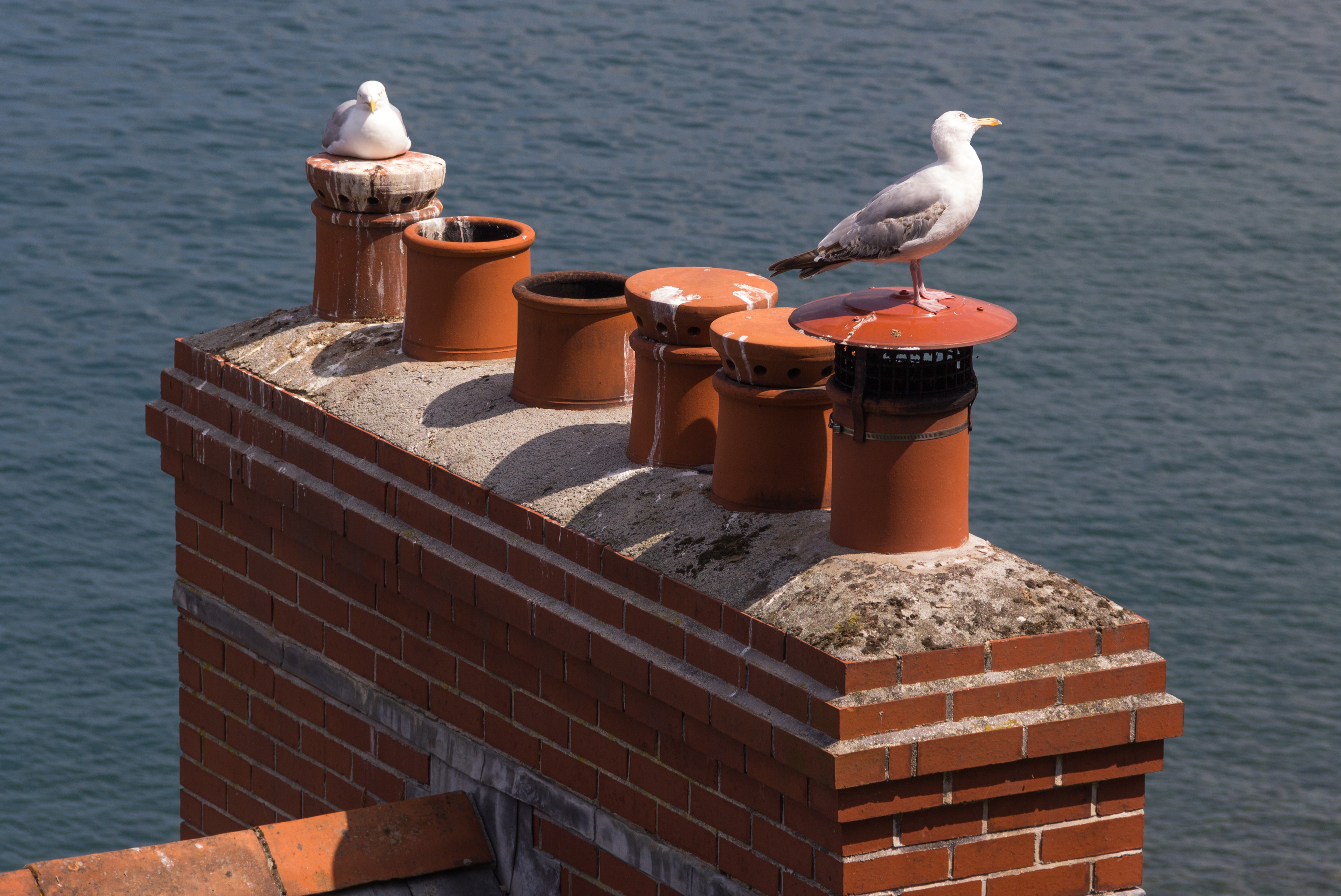 Schornstein in Clovelly, Devon, England